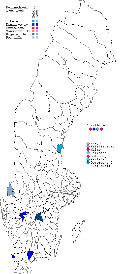 Utgång av fyllnadsvalen till Sveriges riksdags andra kammare åren 1906-1908